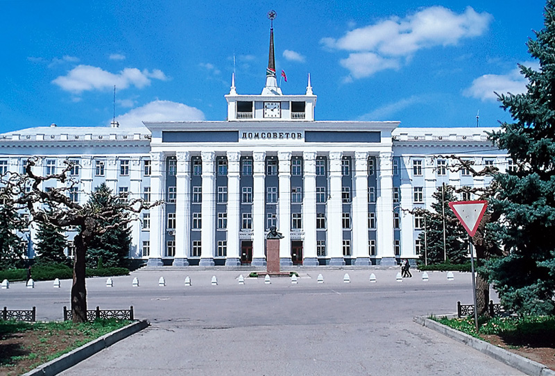 Oberster Sowjet der Stadt Tiraspol/Transnistrien/Moldawien